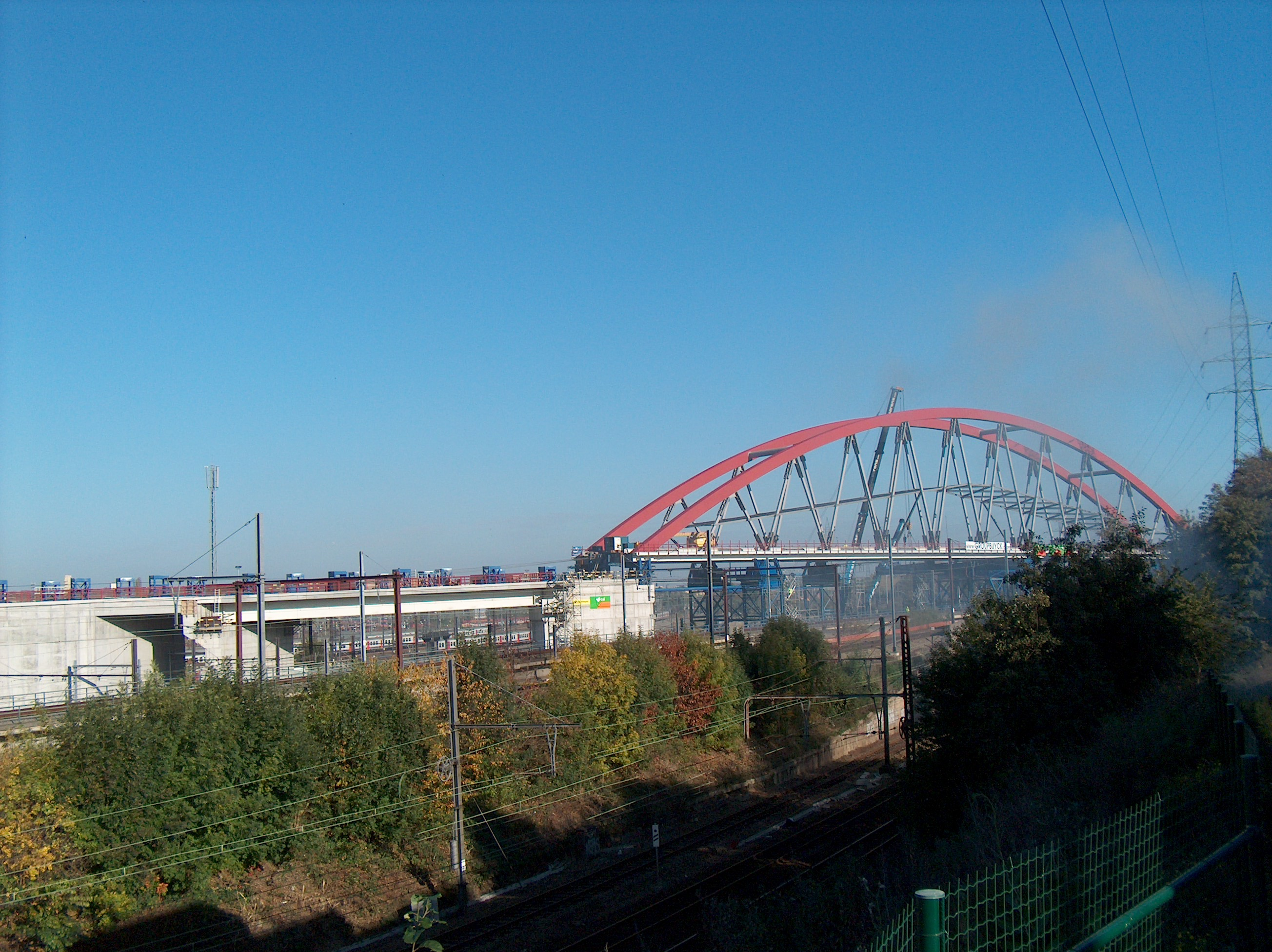 Pont ferroviaire de Schaerbeek, Bruxelles, Belgique.